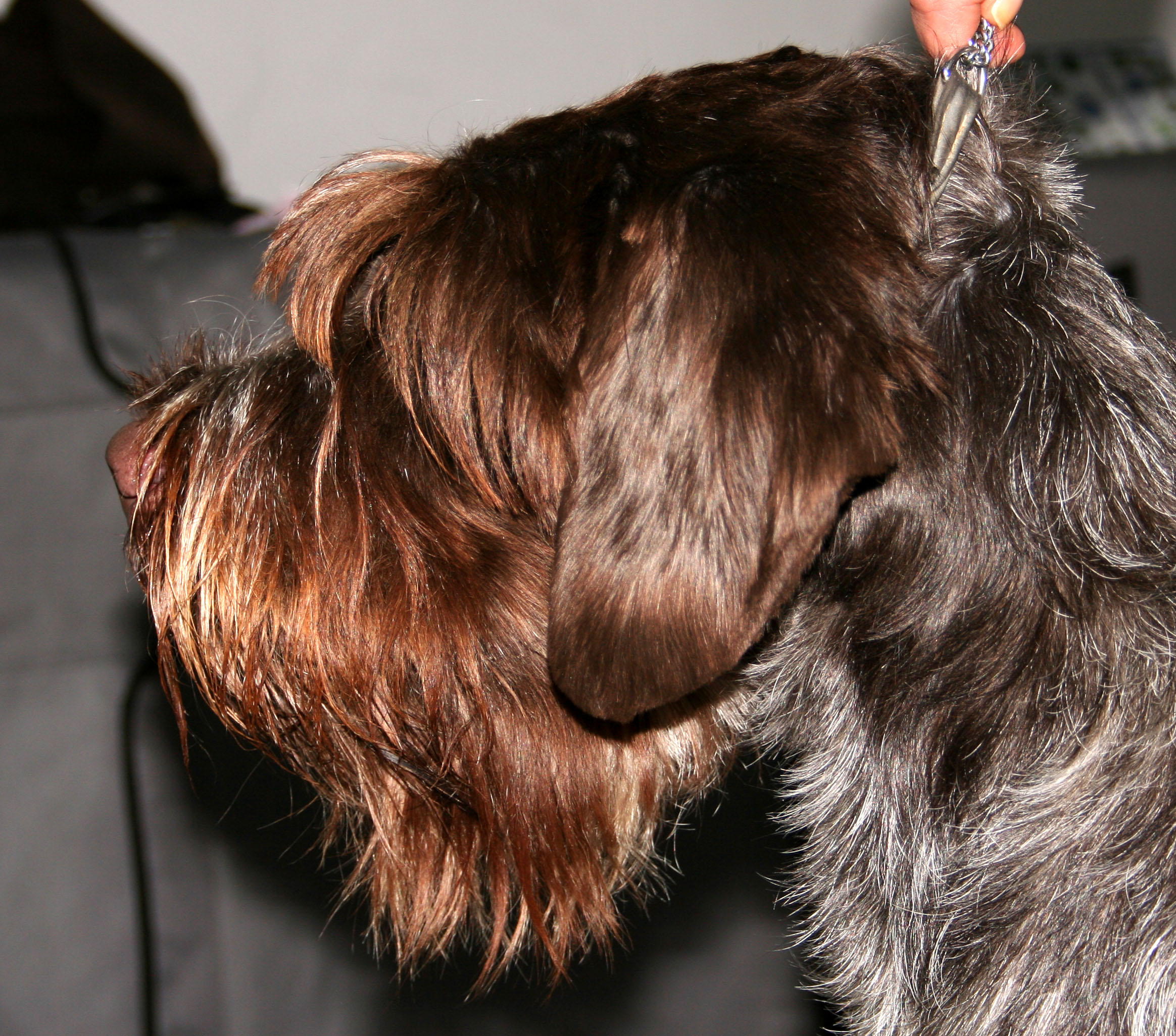 Gryfon_Korthalsa na Światowej Wystawie Psów Rasowych w Poznaniu